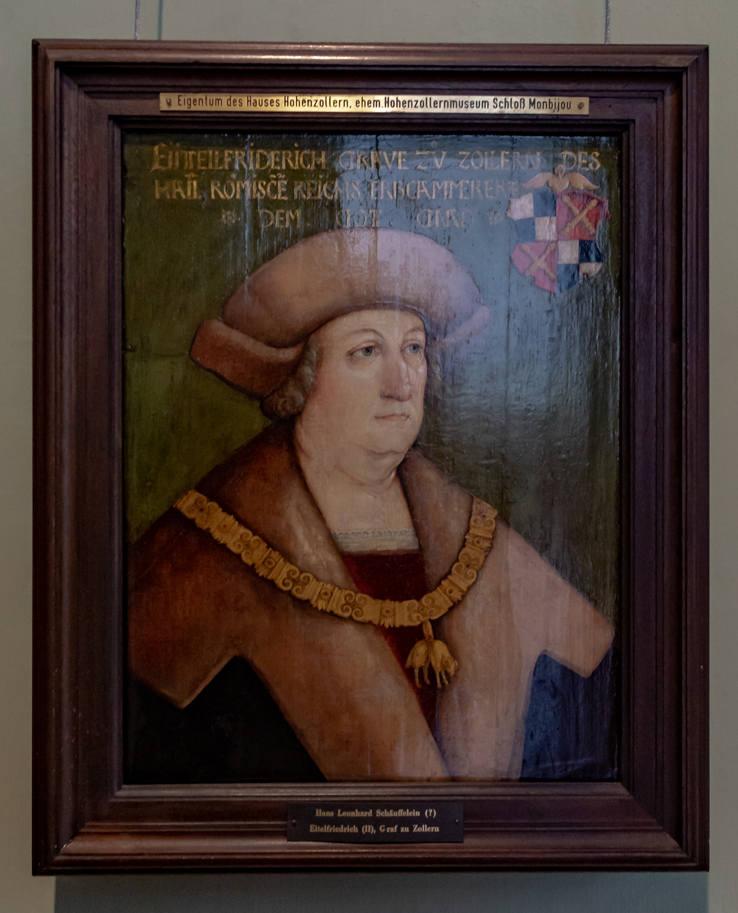 Eitel Friedrich II. (Hohenzollern)